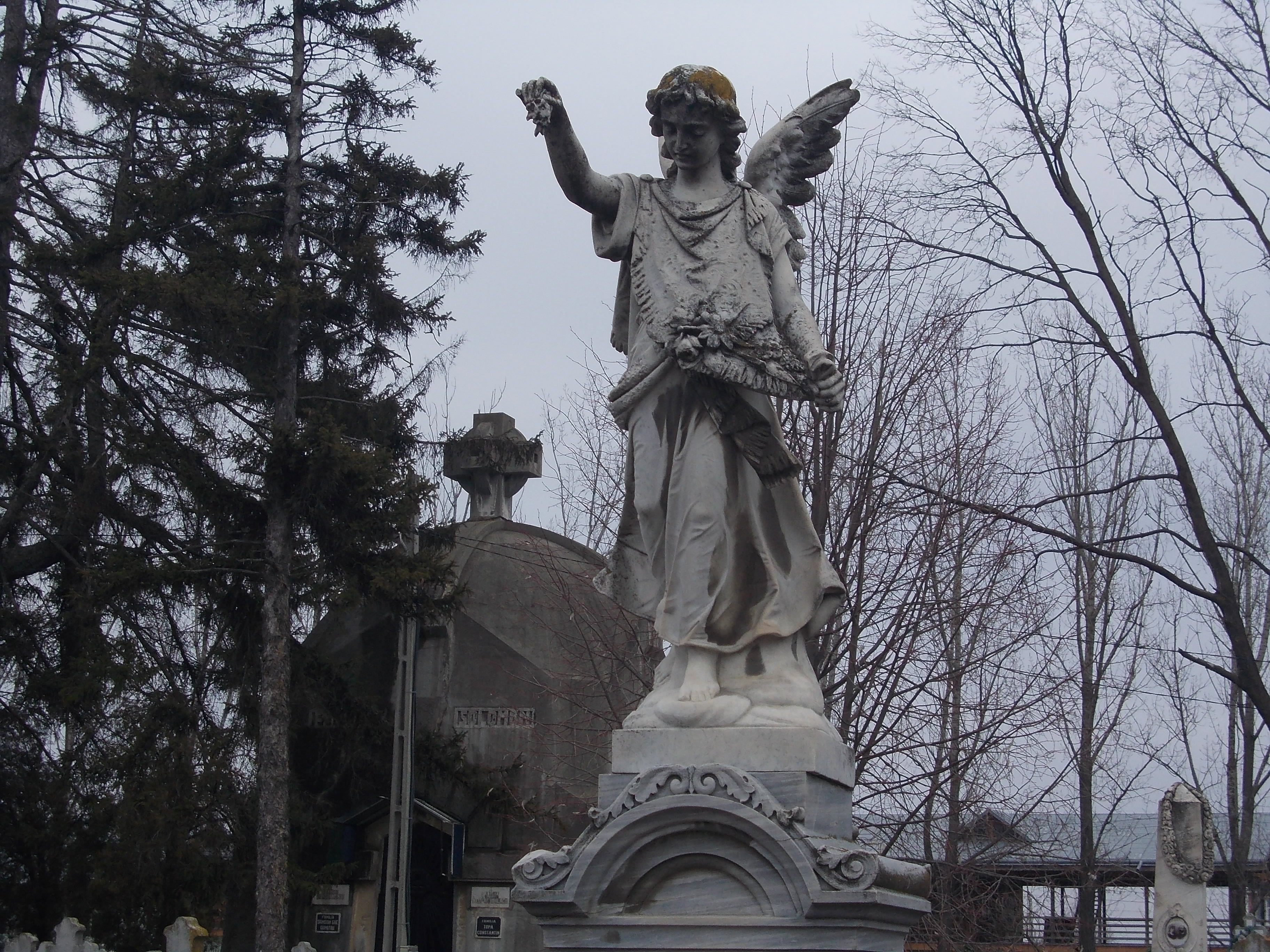 Cimitirul Eternitatea, Roman